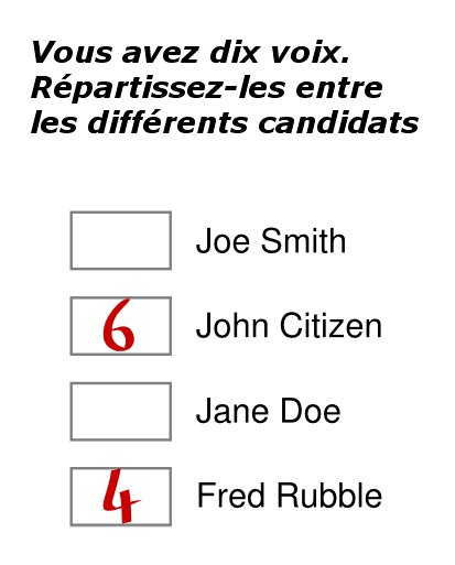 Exemple de bulletin de vote pouvant être utilisé lors d'une élection où le vote cumulatif est en vigueur